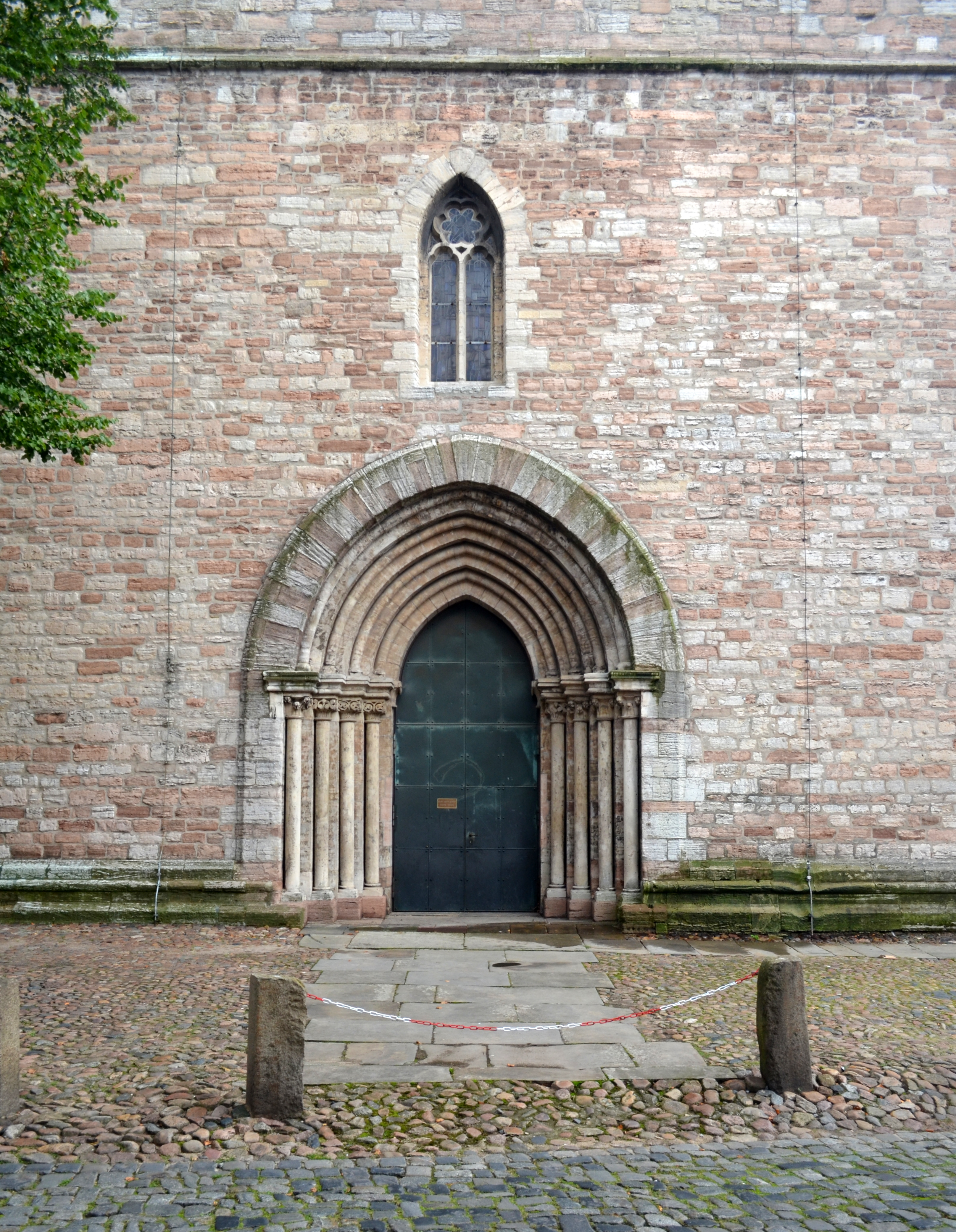 Braunschweig, Magnikirche: Westportal